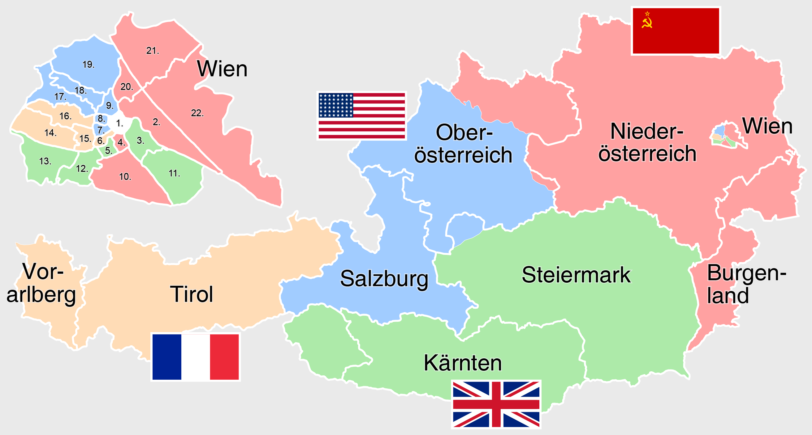 Karte der alliierten Besatzungszonen in Österreich von 1945 bis 1955. Die Zahlen auf der Karte Wiens stehen für die Wiener Gemeindebezirke